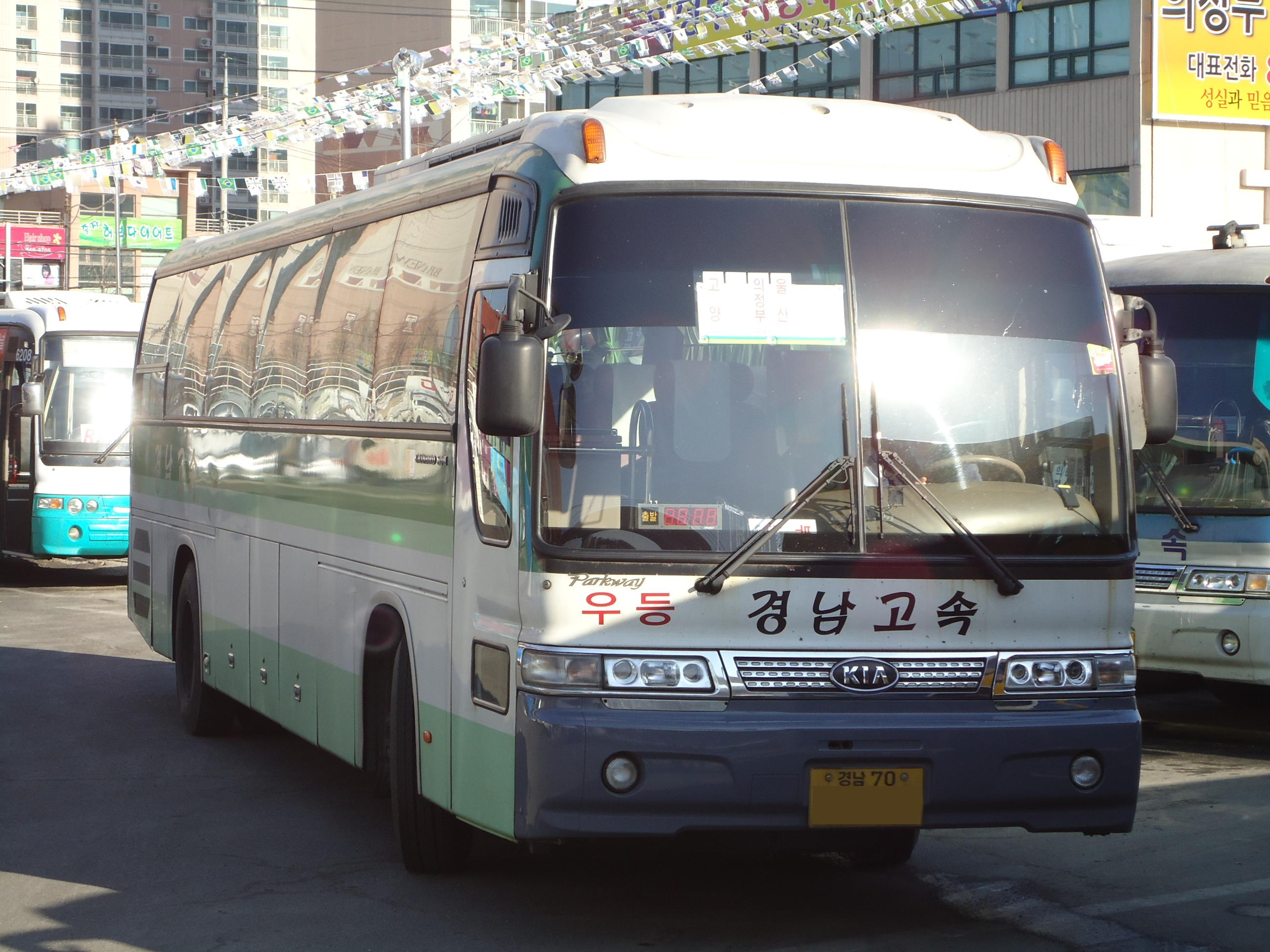 경남고속 그랜버드 SDⅡ슈퍼파크웨이 2007년식 (고양 백석-의정부-울산)